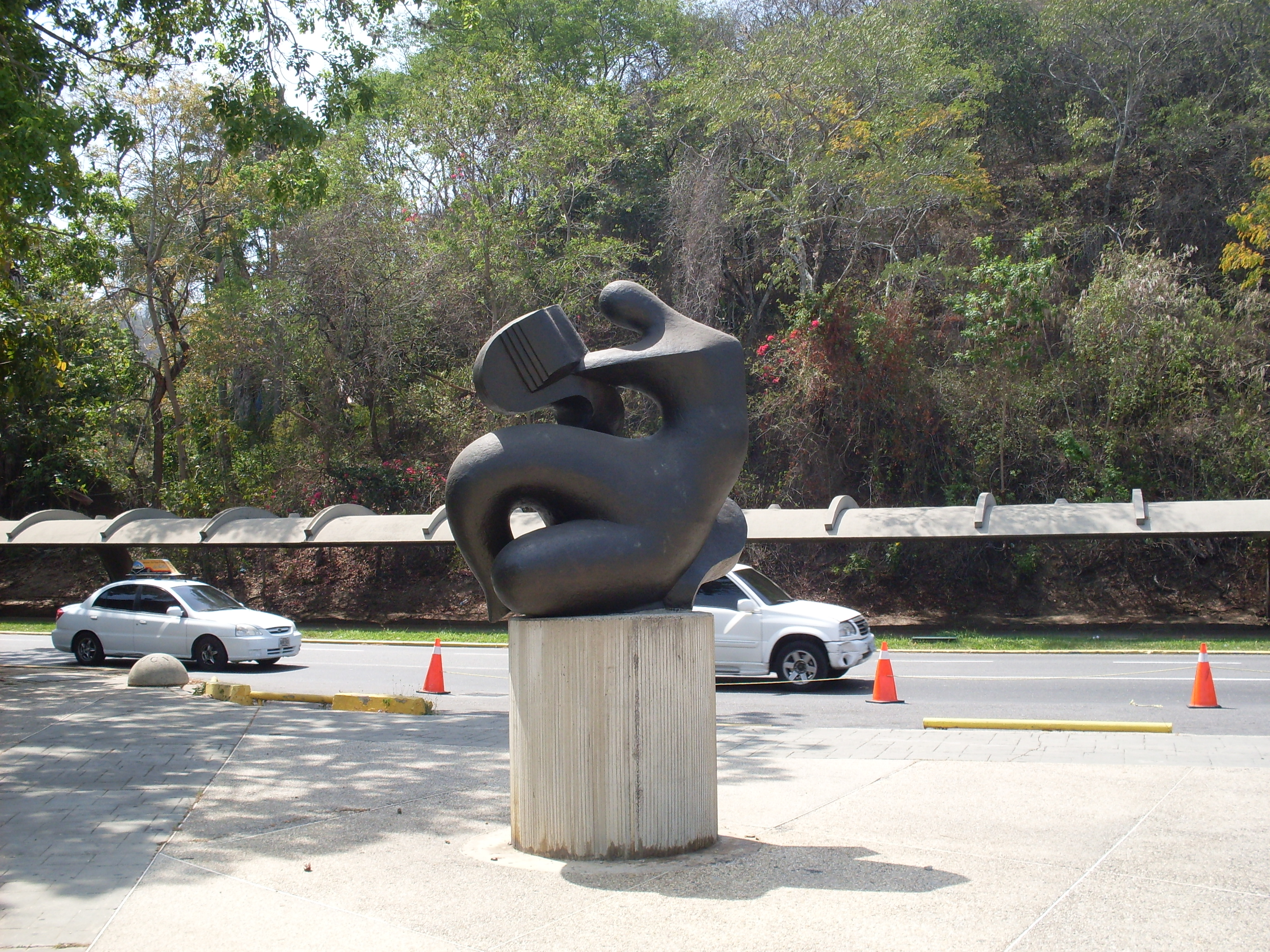 Escultura en bronce de Francisco Narváez. Título: La cultura. Autor: Francisco Narváez. Año: 1954. Ubicación: Universidad Central de Venezuela, Plaza del Rectorado.